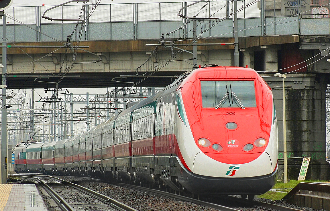 ETR 500.45 di Trenitalia in transito a Milano Rogoredo